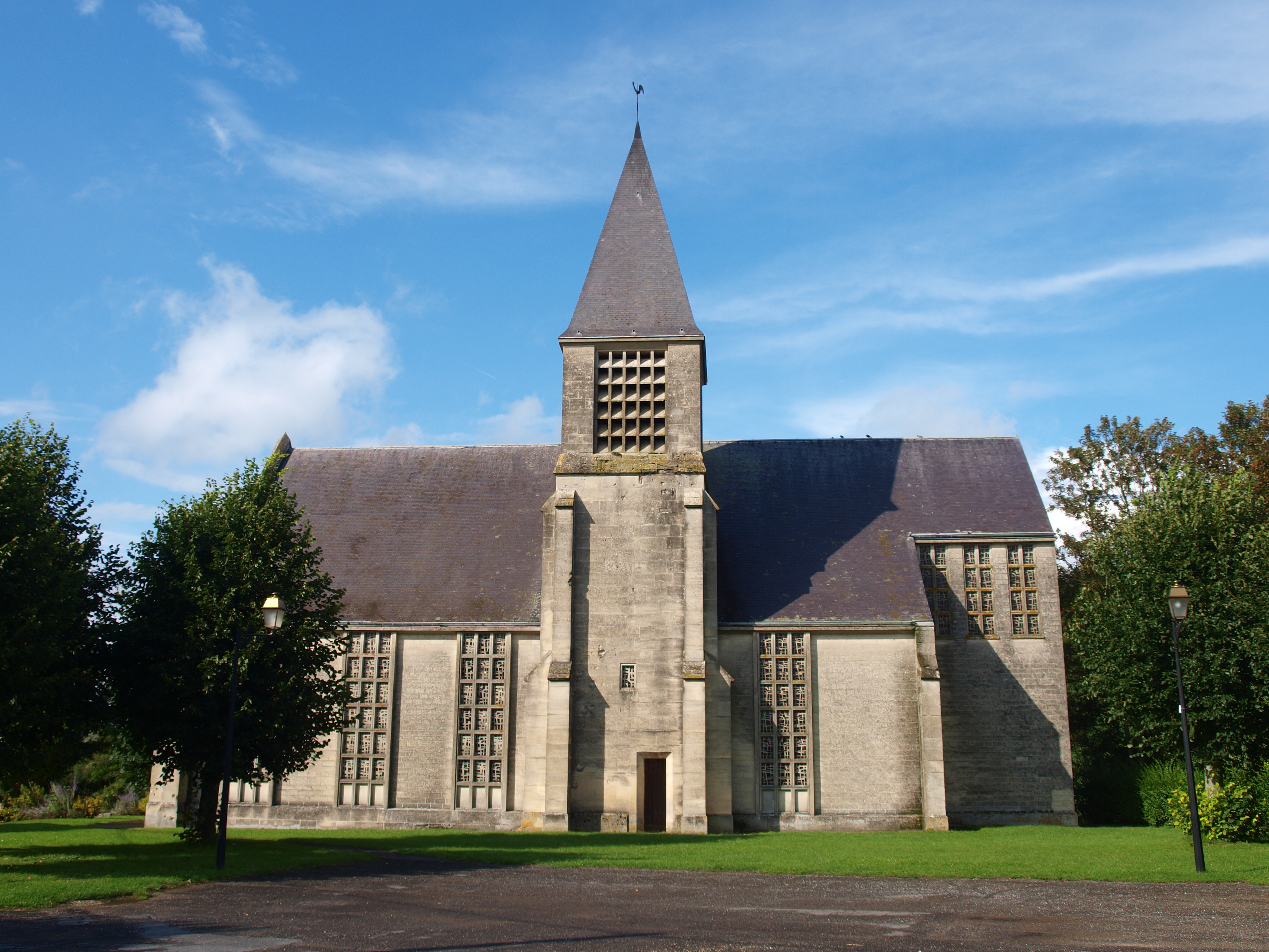 Givry-sur-Aisne (Ardennes, France)